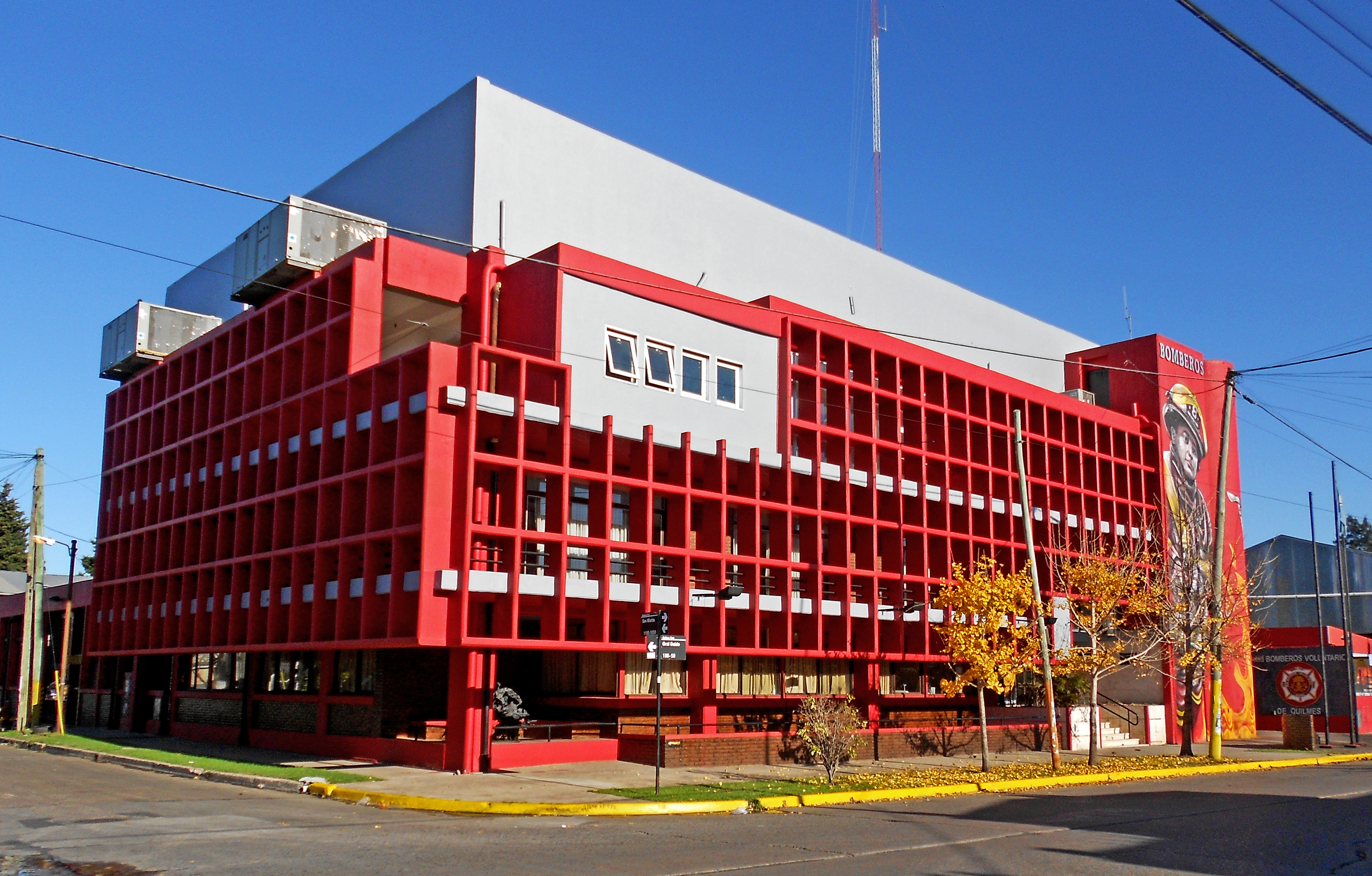 Cuartel Central de la Sociedad de Bomberos Voluntarios de Quilmes, ubicado en la esquina de Guido y San Martín.